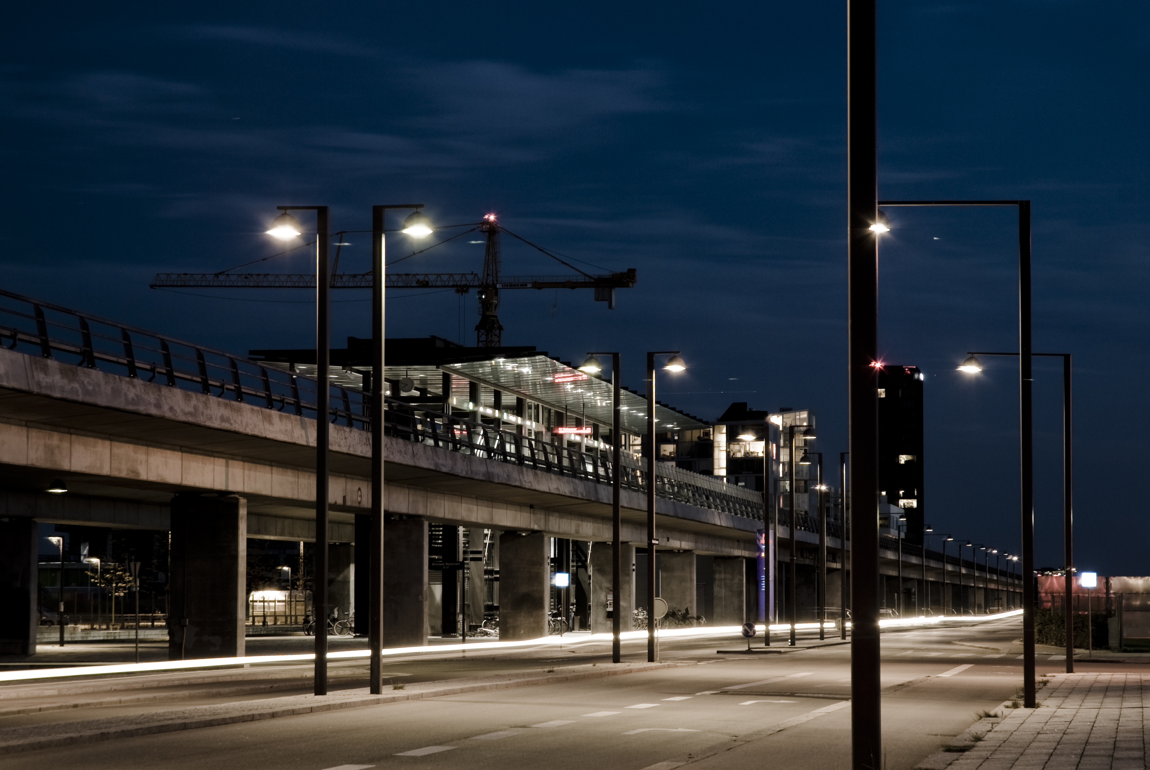 Bella Center Metro Station in Ørestad, Copenhagen, Denmark.